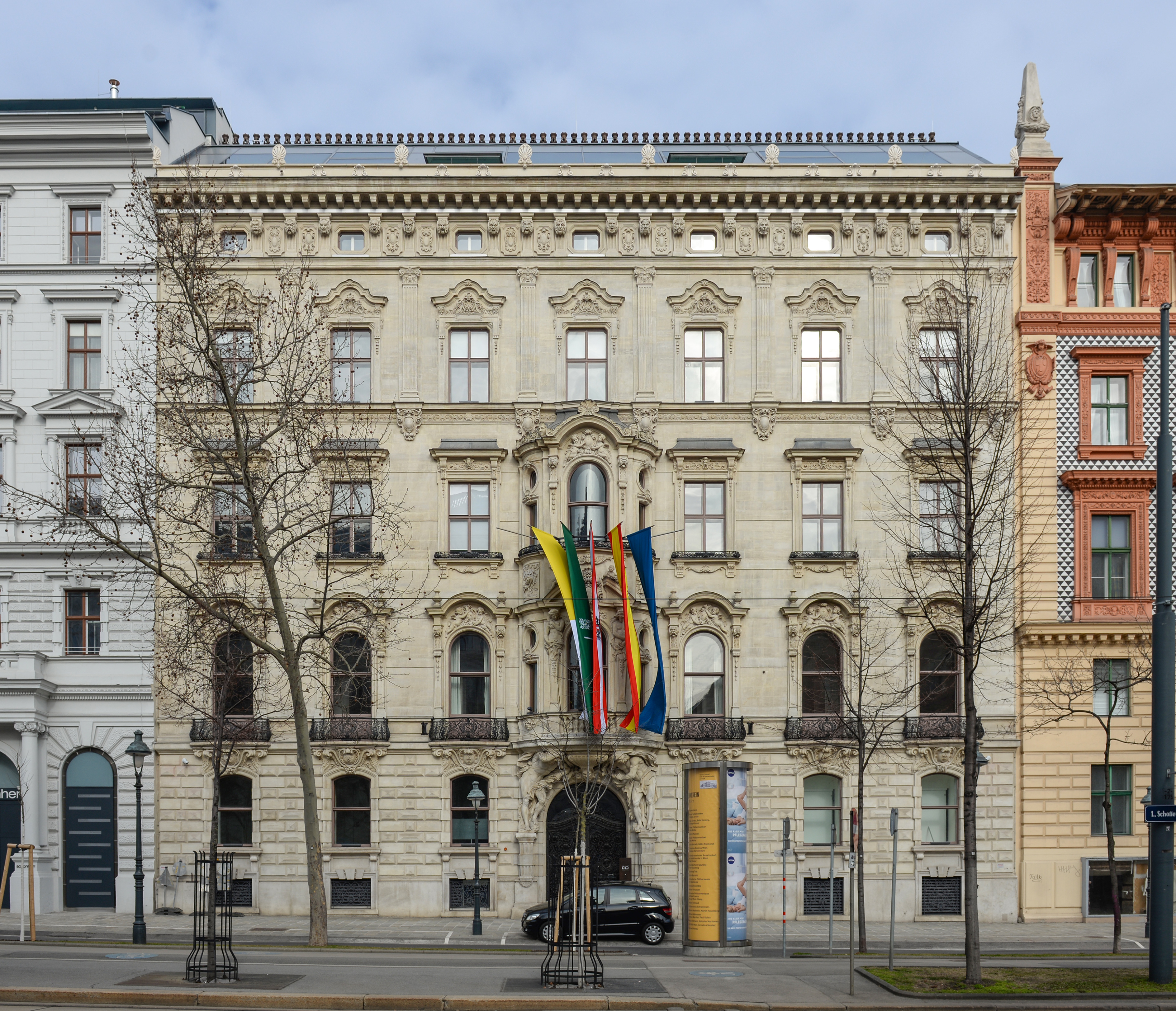 Ehem. Palais Sturany, Theologische Fakultät